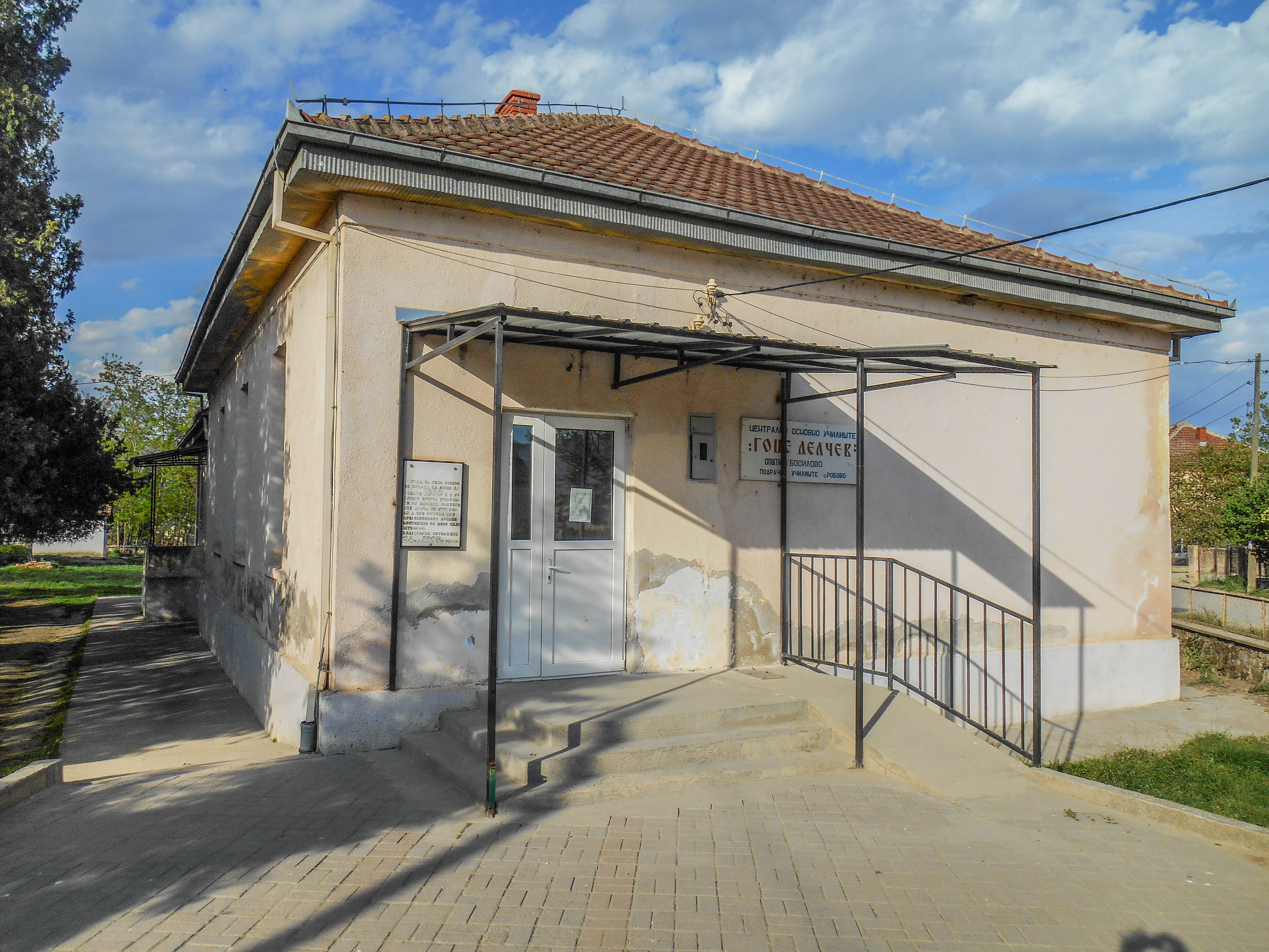 ОУ „Гоце Делчев“ - Робово